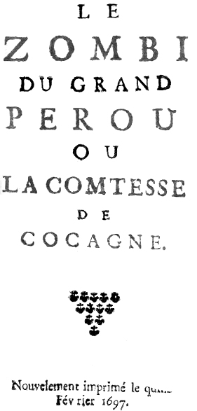 Title page of Pierre-Corneille Blessebois' Zombi du grand Pérou